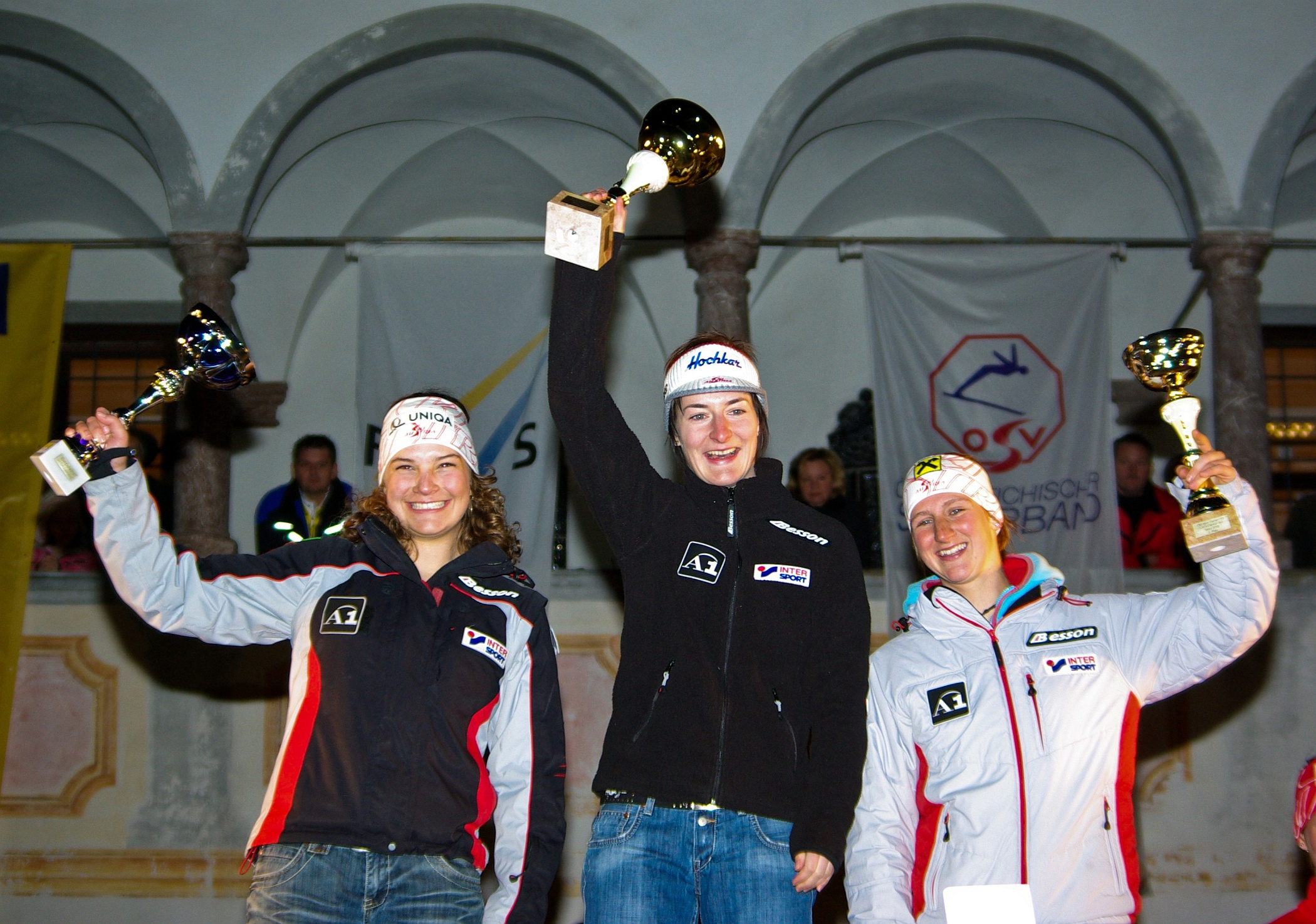 Die Siegerinnen des Riesenslaloms der Österreichischen Alpinen Skimeisterschaften 2009: 1. Platz: Kathrin Zettel (mitte), 2. Platz: Ramona Siebenhofer (links), 3. Platz: Karin Hackl (rechts)